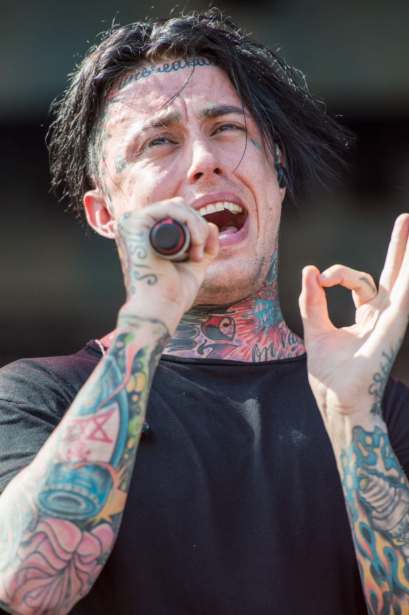 ARGO-Konzerte,Centerstage,Falling in Reverse,Konzert,Livekonzert,Livemusik,Musik,RiP,Rock im Park 2014,Ronnie Radke